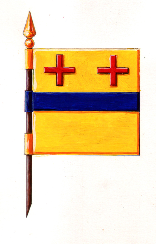 Flag of Starčevo, near Pančevo, Vojvodina (Serbia)/Drapeau de la ville d'Starčevo, près de Pančevo, Voïvodine (Serbie)